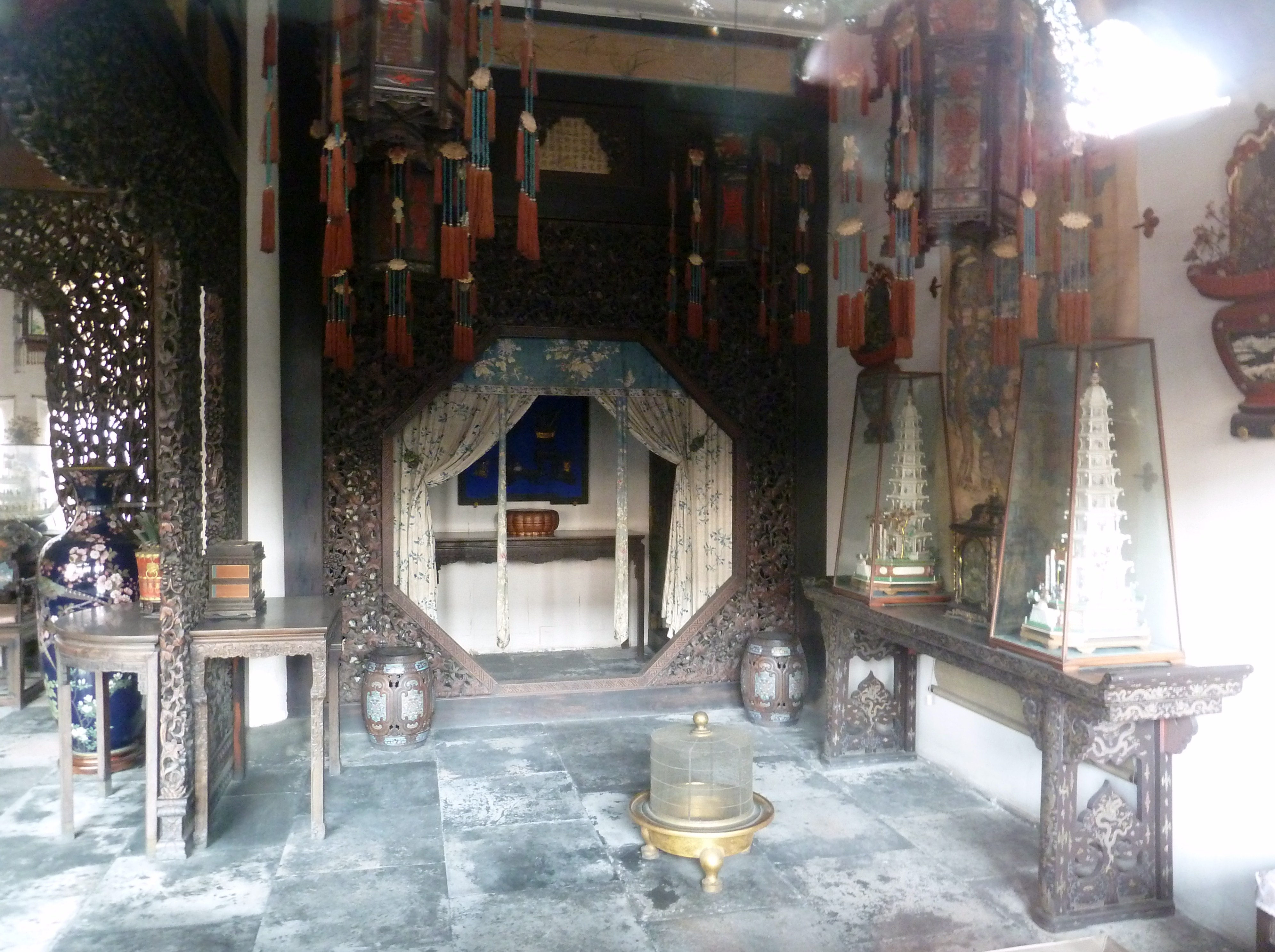 Dans la Cité_interdite, à Pékin .- ,Chine